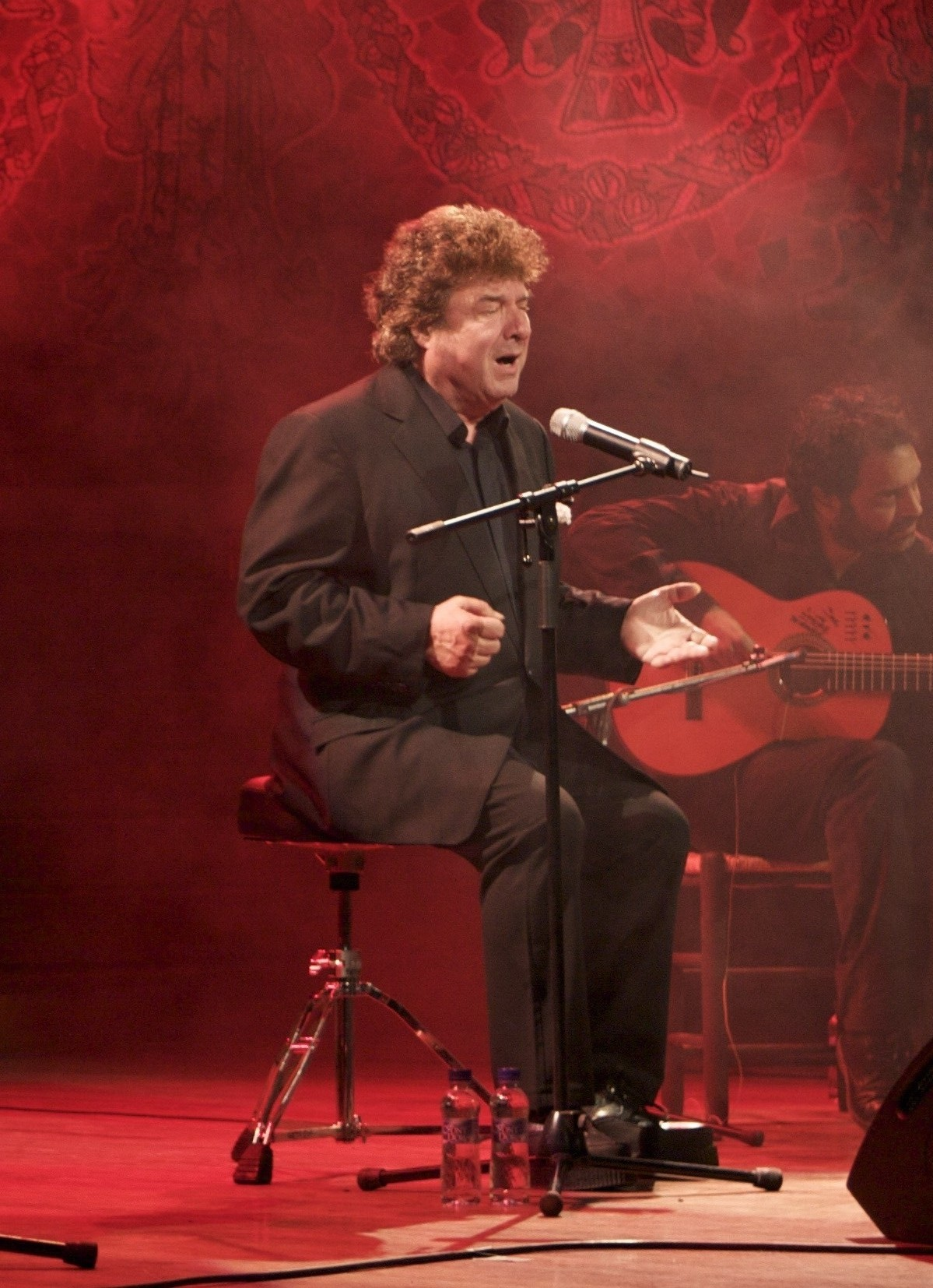 Enrique Morente en el Palau de la Música Catalana el 13 de marzo de 2009.